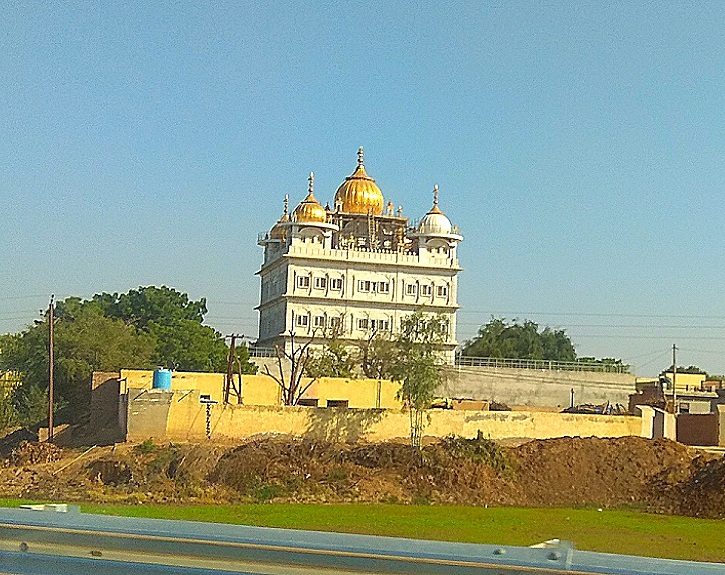 Baba Deva singh radha swami dera at 9Gb village,Near Hai satr,Rajasthan,India.